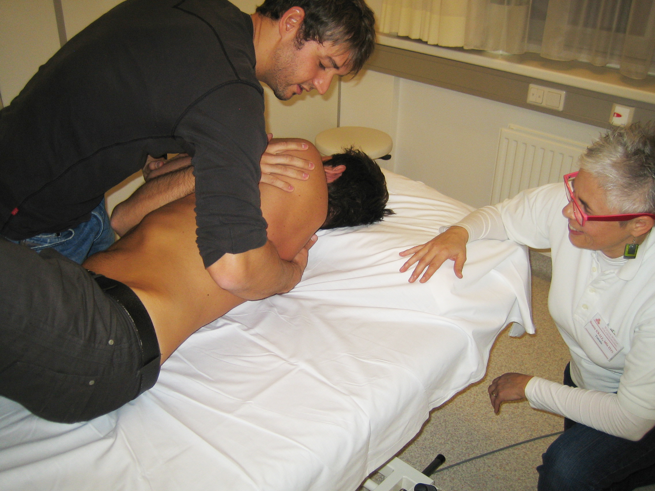 Lehrklinik der Wiener Schule für Osteopathie an der Wiener Privatklinik